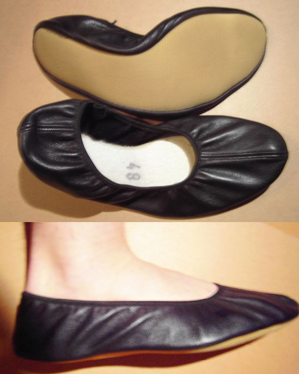 Gymnastikschuhe, eigene Fotografie